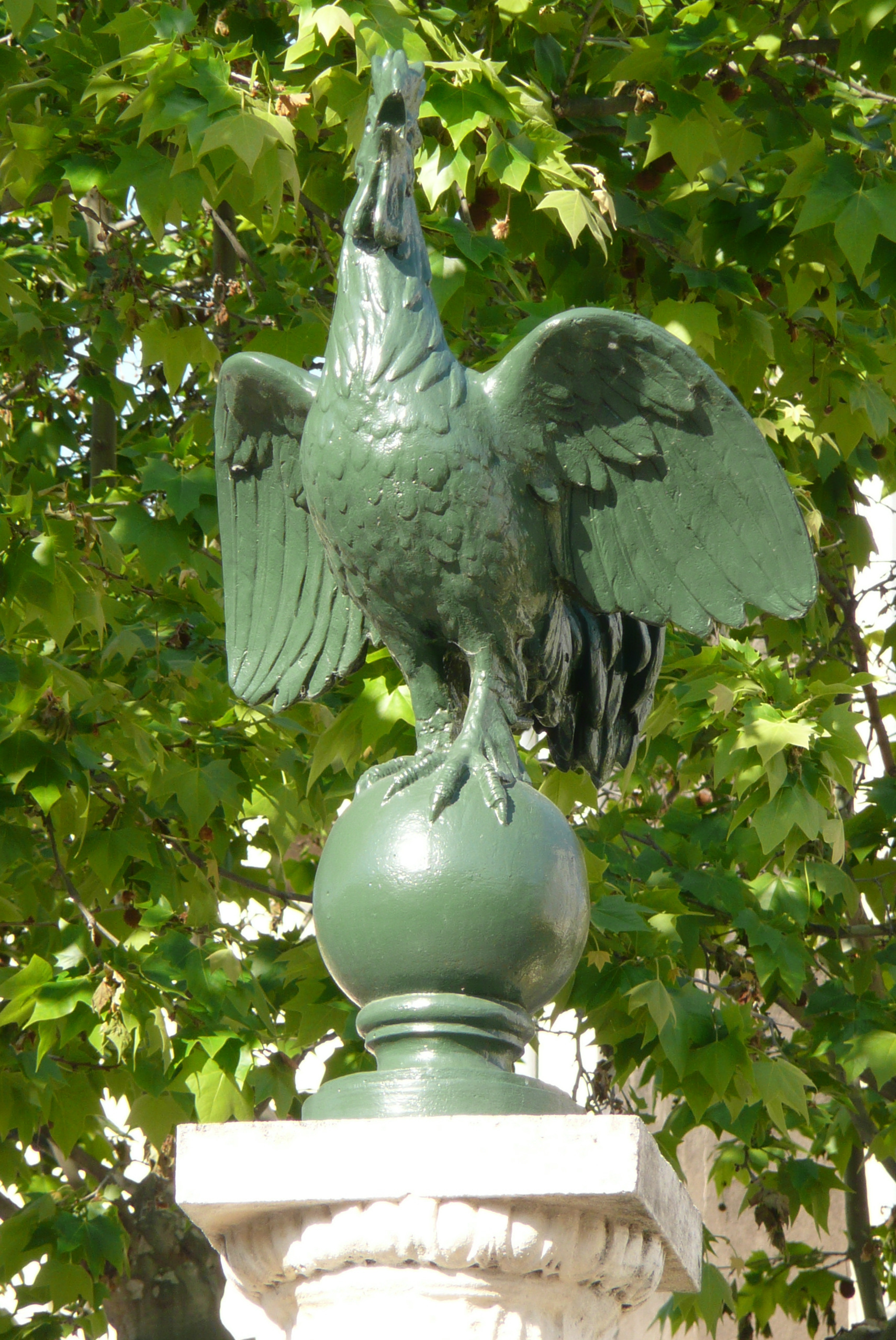 Statue à Pont-Saint-Esprit.